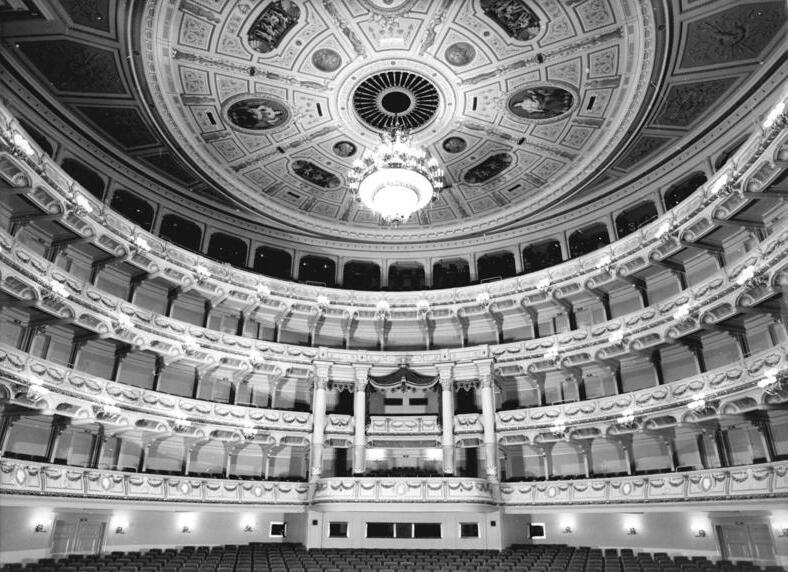 Dresden, Semperoper, Zuschauerraum ADN-ZB Häßler 9.2.85 Dresden: Semperoper. Die 1945 schwer zerstörte Dresdner Semperoper öffnet am 13.2.85, am 40. Jahrestag des Bombenangriffs, wieder ihre Pforten. Der Zuschauerraum wurde weitgehend originalgetreu rekonstruiert. Die Bauleute griffen dabei auf Archivmaterial zurück. Vorgenommene Veränderungen dienen der Verbesserung der Sitz- und Sichtverhältnisse. Der vergrößerte Zuschauerraum verfügt jetzt über 1.300 Plätze. Bei der Bombardierung wurden der Zuschauerraum und das Bühnenhaus am schlimmsten betroffen. (siehe 1-3n, 5-13n) Achtung! Redaktionen! Sperrfrist 13.2.85, 19 Uhr!